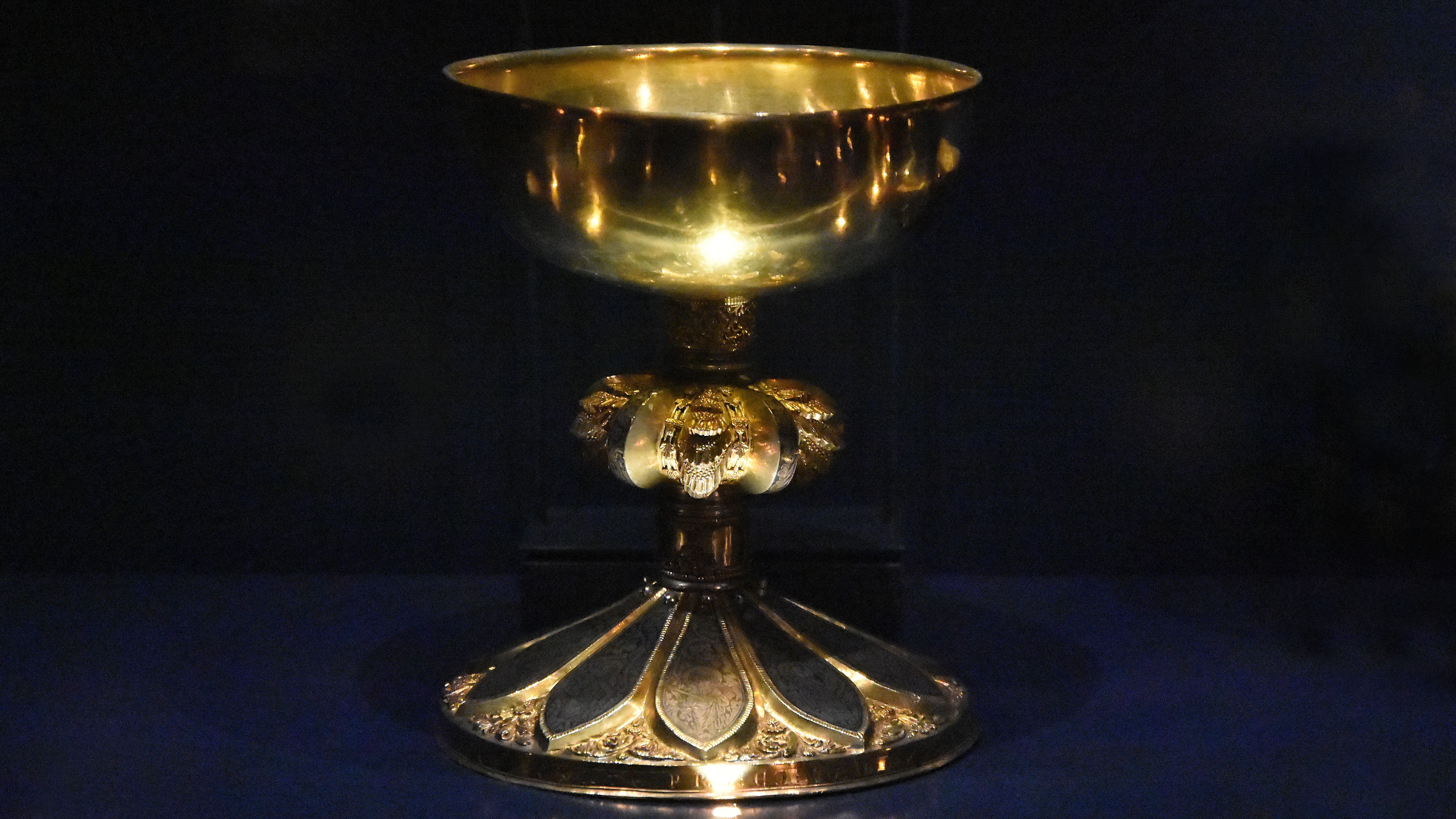 Kelk van de kerkschat van Oignies, vervaardigd door Hugo van Oignies rond 1228